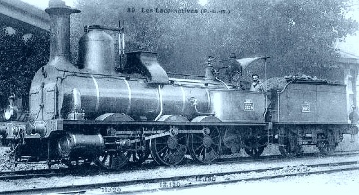 3/3-gekuppelte Lokomotive Typ Bourbonnais der Eisenbahngesellschaft Paris-Lyon-Méditerranée (PLM)